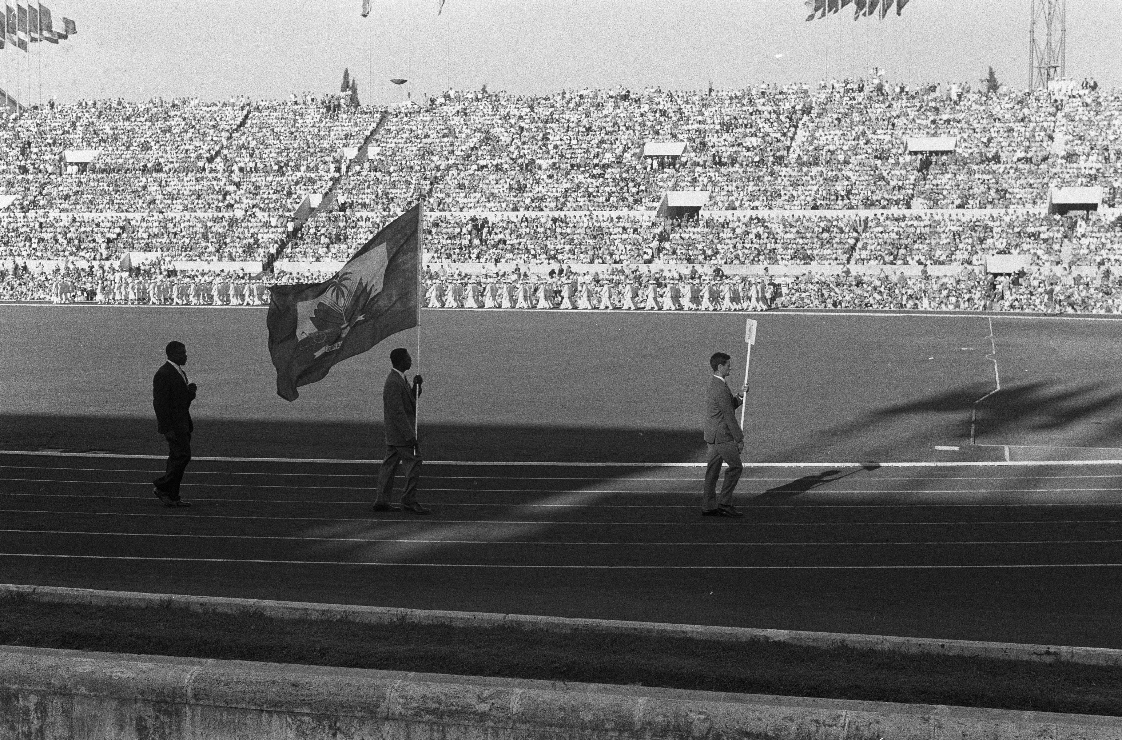 Collectie / Archief : Fotocollectie Anefo Reportage / Serie : [ onbekend ] Beschrijving : Olympische Spelen te Rome. Opening. Intocht der atleten in het Olympisch Stadion. [De delegatie van Haïti bestaat uit 1 atleet, gewichtheffer Philomene Lagurre en delegatiehoofd Pierre Plaisimond] Annotatie : Tijdens zijn wedstrijd slaagde hij er alleen in 1 gewicht te drukken Datum : 25 augustus 1960 Locatie : Rome Trefwoorden : atleten, openingen Instellingsnaam : Olympisch Stadion Fotograaf : Pot, Harry / Anefo Auteursrechthebbende : Nationaal Archief Materiaalsoort : Negatief (zwart/wit) Nummer archiefinventaris : bekijk toegang 2.24.01.05 Bestanddeelnummer : 911-5400